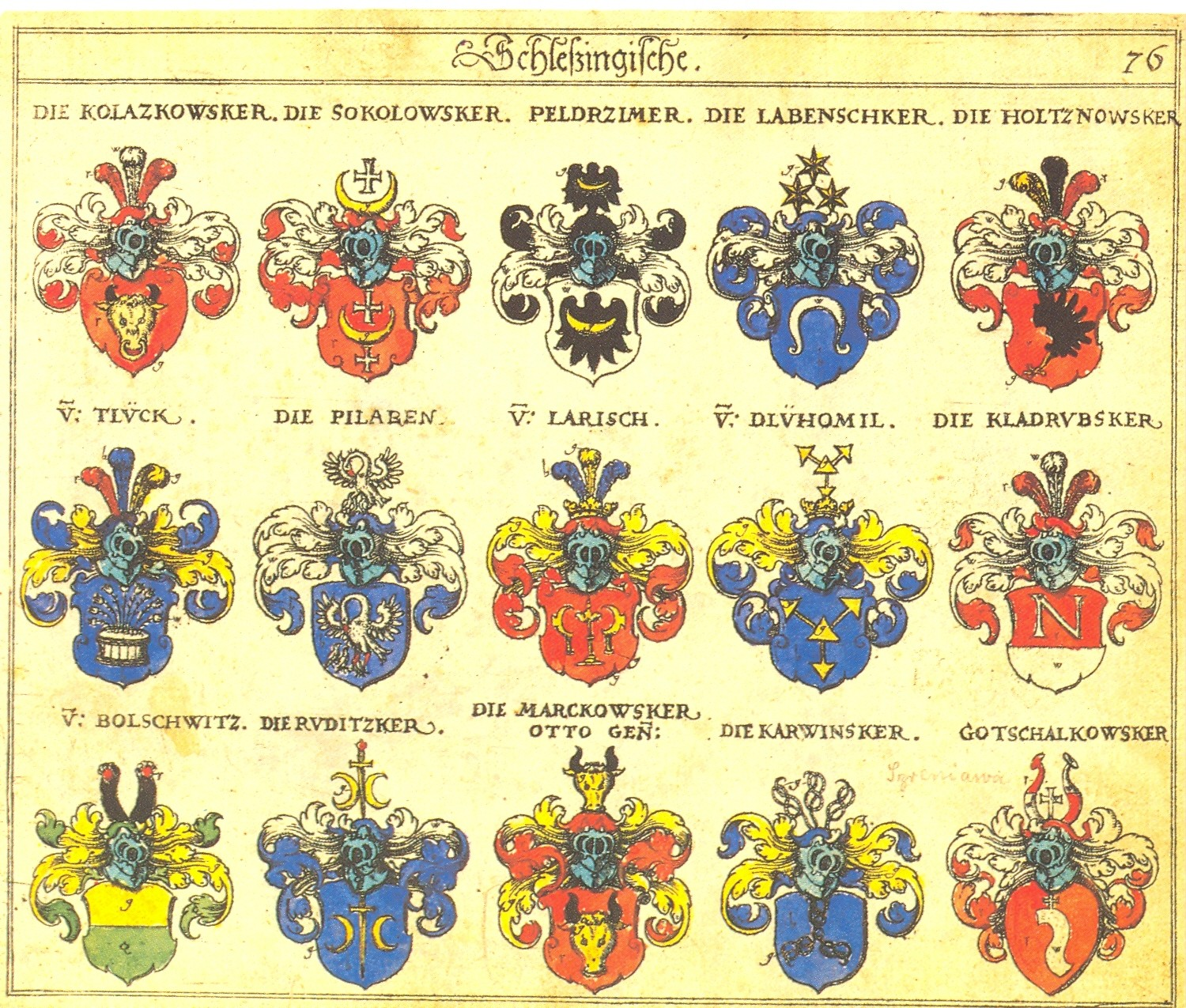 Johann Siebmacher: New Wappenbuch eingescannt aus: Horst Appuhn (Hrsg.), Johann Siebmachers Wappenbuch. Die bibliophilen Taschenbücher 538, 2. verb. Aufl , Dortmund 1989 Schlesische Blatt 76